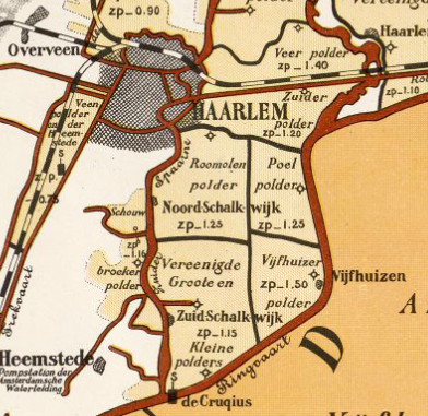 polders ten zuidoosten van Haarlem